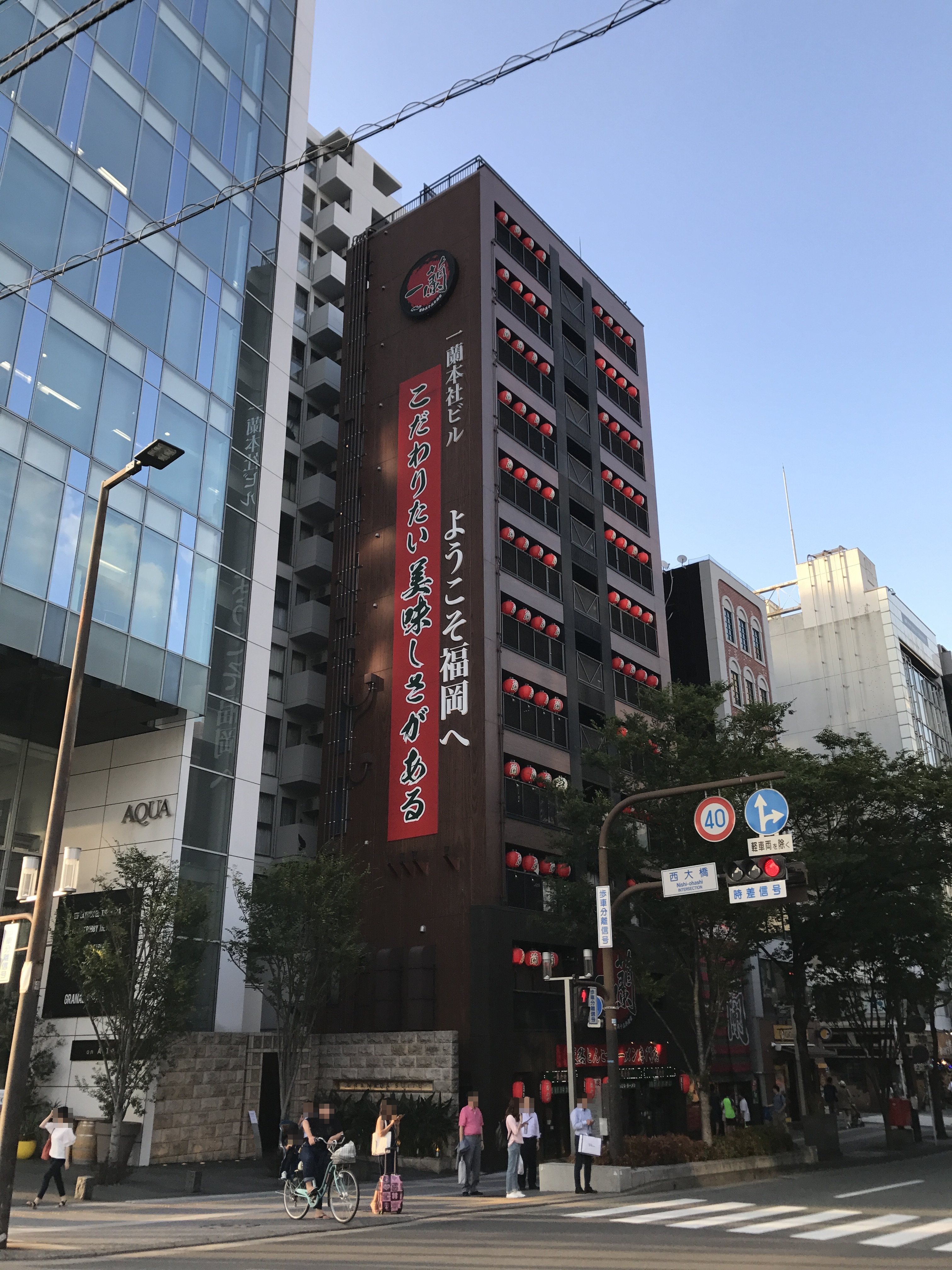 一蘭本社ビル